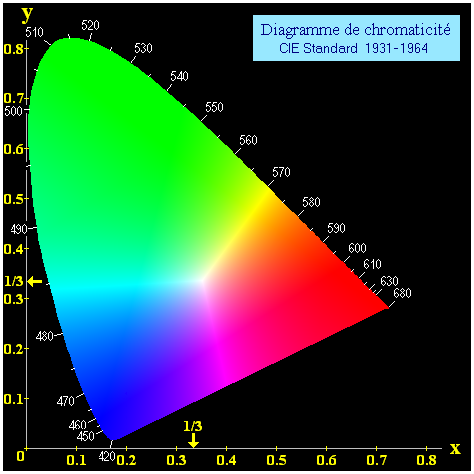 Diagramme de chromaticité (gamut de l'oeil humain) d'après la CIE (Commission Internationale de l'Éclairage, 1931 - 1964) Le point {x=1/3 ; y=1/3} correspond au blanc ! cf. mon article "Codage informatique des couleurs"